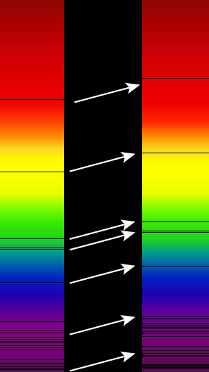 Optilise spektri spektrijoonte punanihe kaugete galaktikate superparvede (parempoolne), võrreldes Päikesega (vasakpoolne)